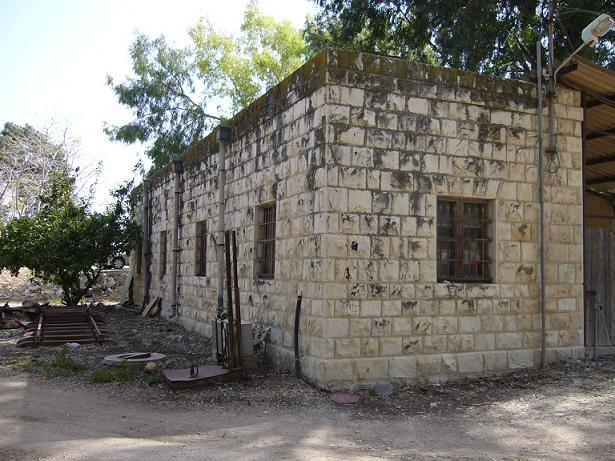 תחנת רכבת העמק בקיבוץ יגור.צילמתי והעלתי במרץ 2006.אסף.צ 17:03, 24 מרץ 2006 (UTC)